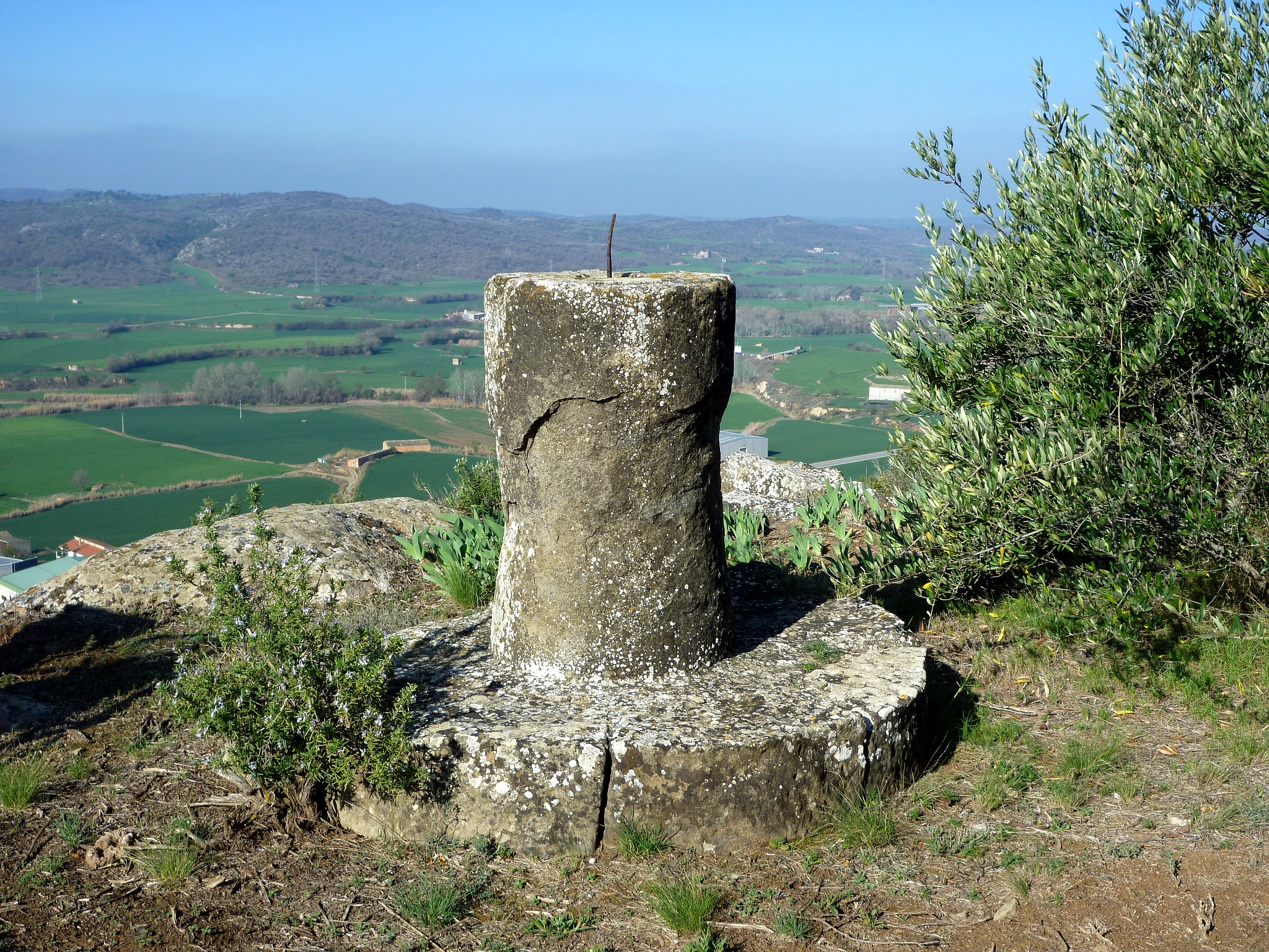 Pilaret amb una creu de ferro (destruïda), a l'indret de la Creueta, a mitja costa de l'Aguda, a Torà.